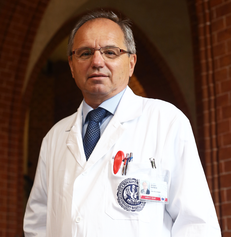 Osobní foto